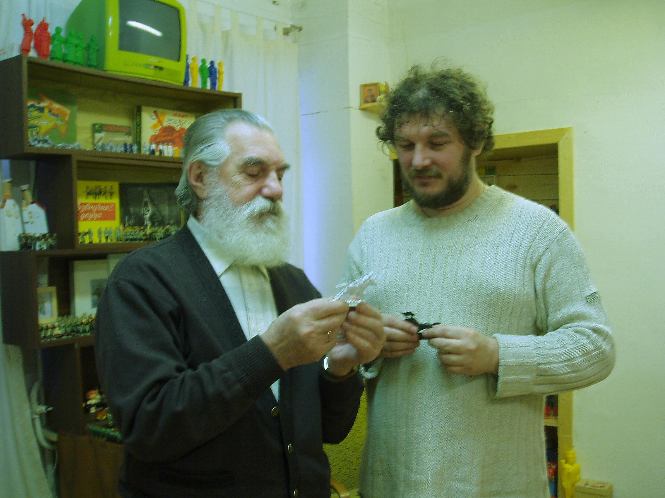 Тимур Замилов и художник-солдатист Борис Дмитриевич Савельев. 2006 г.